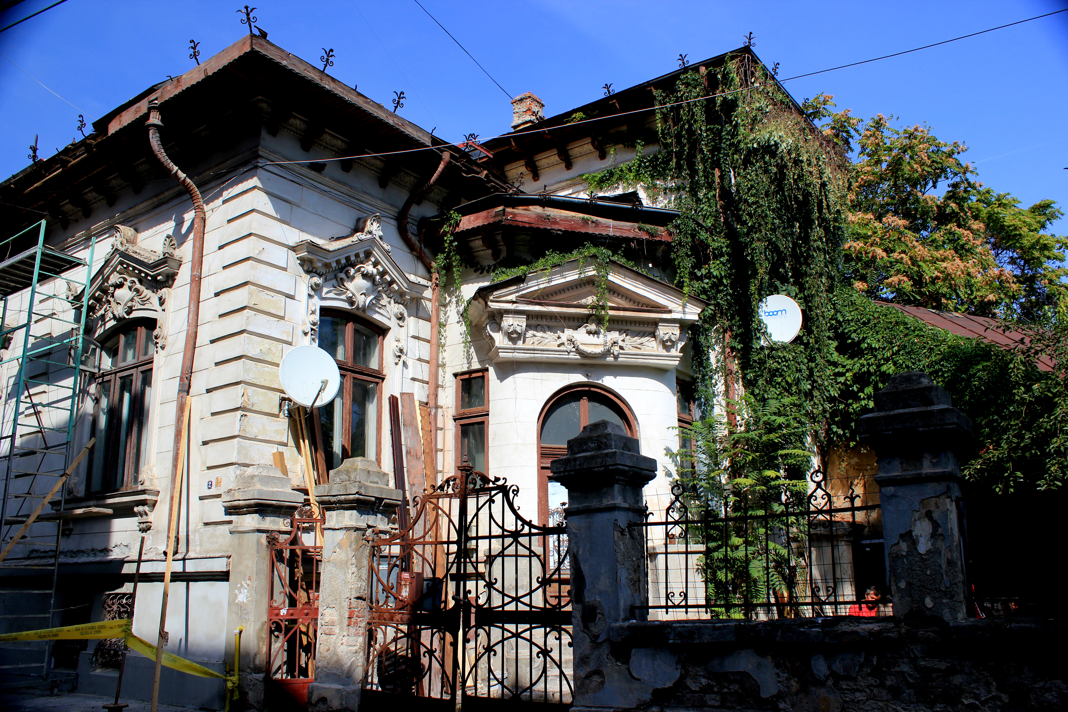 Casă Bocsa 2